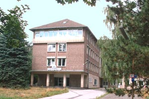 Das leerstehende Marienhospital Kirchhörde